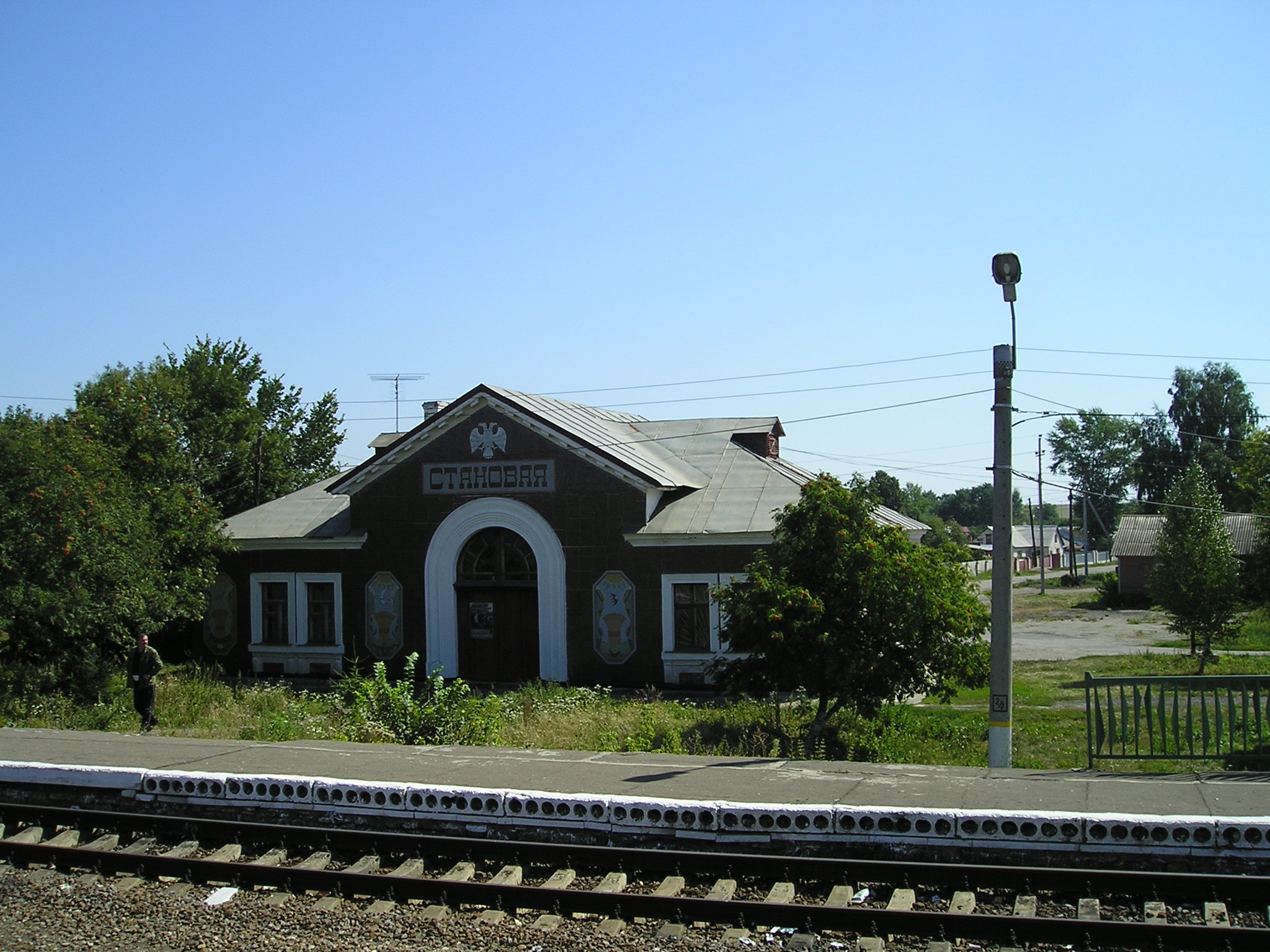 Становая, вокзал